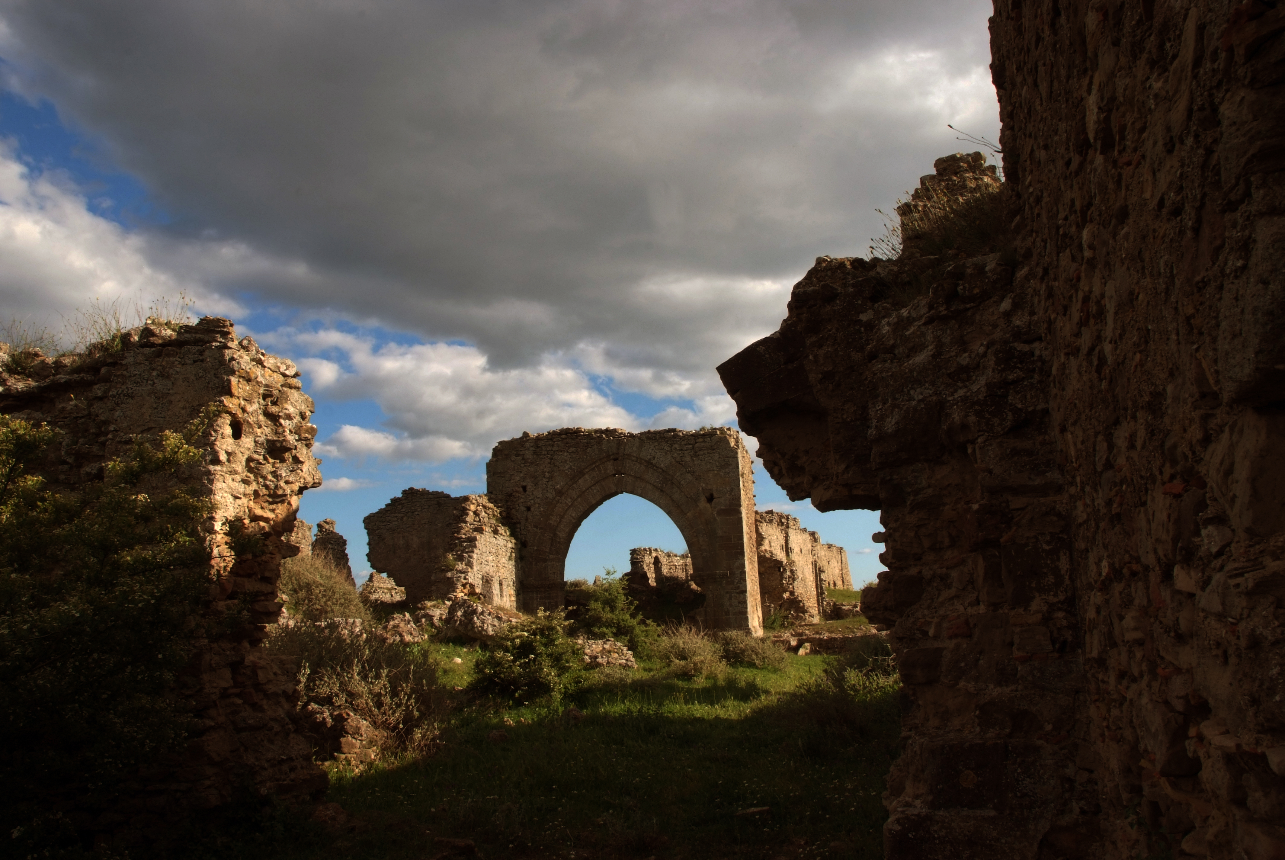 Ferrandina ha avuto origine dalle rovine dell'antico centro di Uggiano che fu distrutto da un terremoto nel 1456. La fondazione del paese, la si deve a Federico d'Aragona nel 1490 che accolse tutti gli scampati di Uggiano e diede il nome del padre re Ferrante o Ferrantino. L'antico stemma del paese aveva raffigurate sei F: " Federicus Ferrantis Filius Ferrandinam Fabricare Fecit".